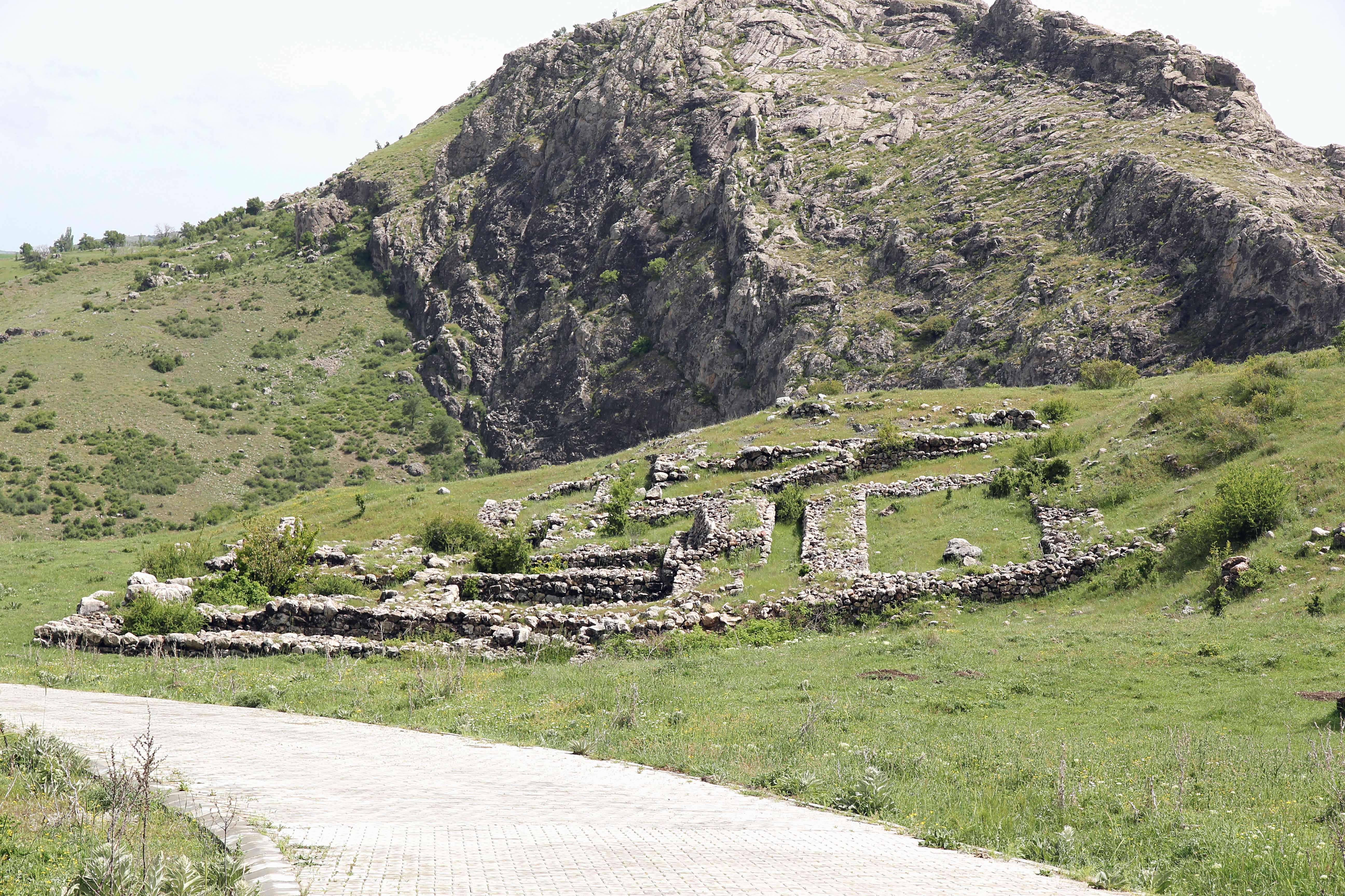 Ḫattuša, hethitische Hauptstadt bei Boğazkale, Zentraltürkei, Haus am Hang